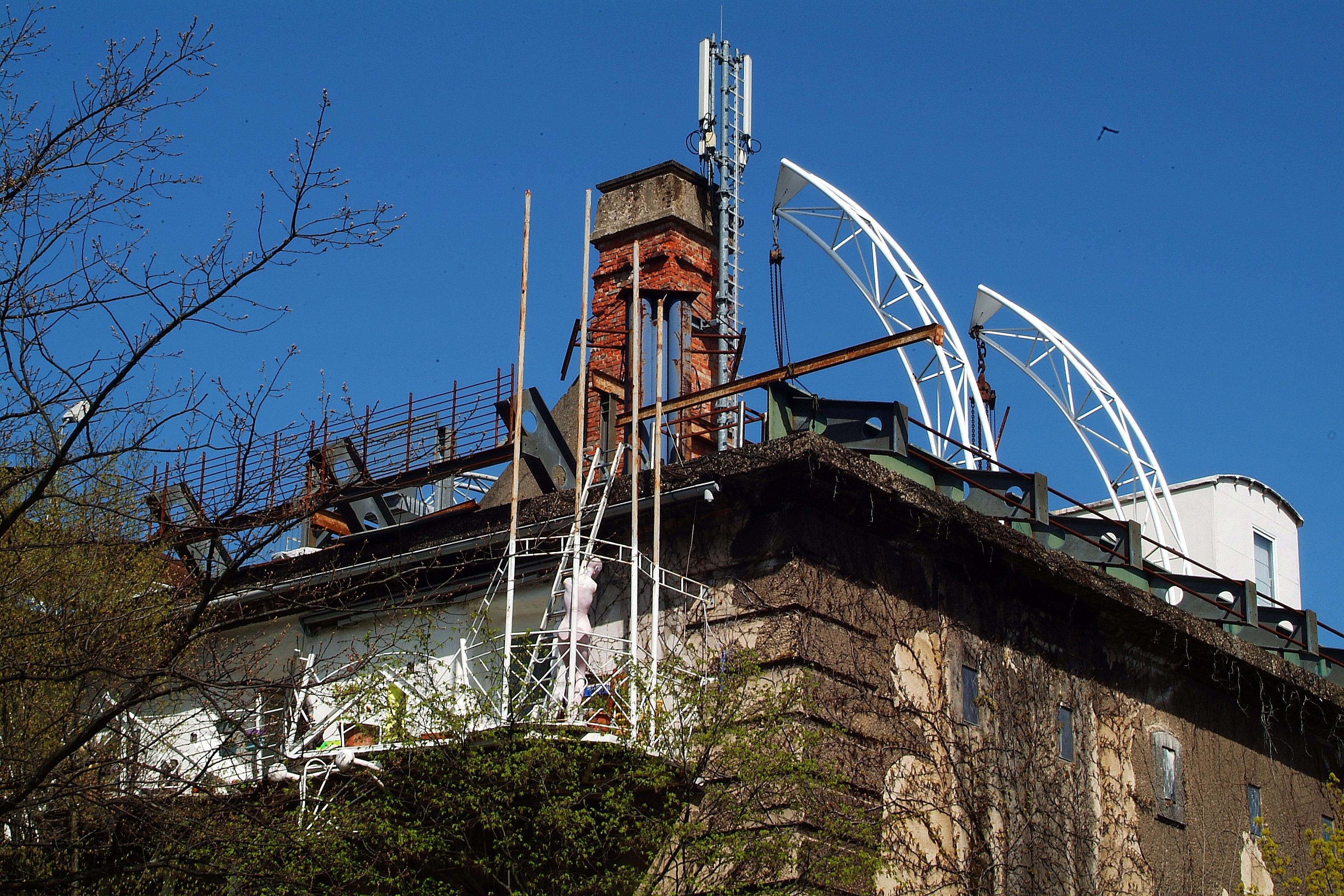 Sie haben ein besseres Bild? Sogar ein historisches Dokument als Bild(ungsförderung)? Zeigen Sie' s uns. Stiften Sie es doch auch - allen Menschen.